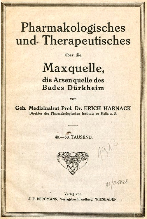 Maxquelle Bad Dürkheim, Rheinland-Pfalz (früher Bayern), Buchtitel einer Schrift über die Quelle